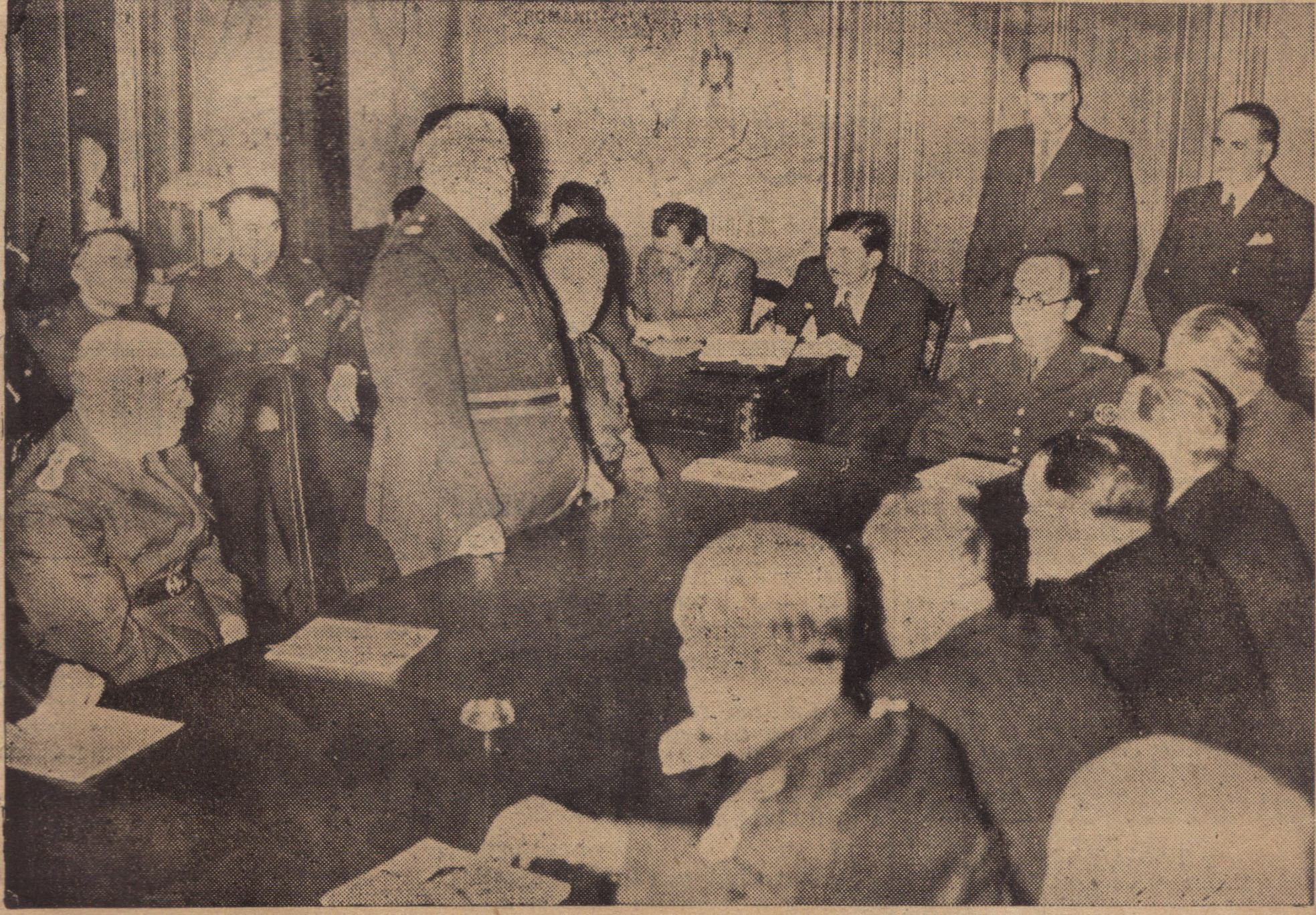 Profesorul C.C. Giurescu, ministrul FRN, prezidând ședința festivă a CAPIR (Confederația Asociațiunilor de Profesioniști Intelectuali din România) din noiembrie 1939. Vorbește prof. Constantin C. Stoicescu, rectorul Universității București. Asistă președintele I.Gr. Periețeanu, secretarul general dr. Popescu-Buzău și senatorul arhitect I.D. Enescu